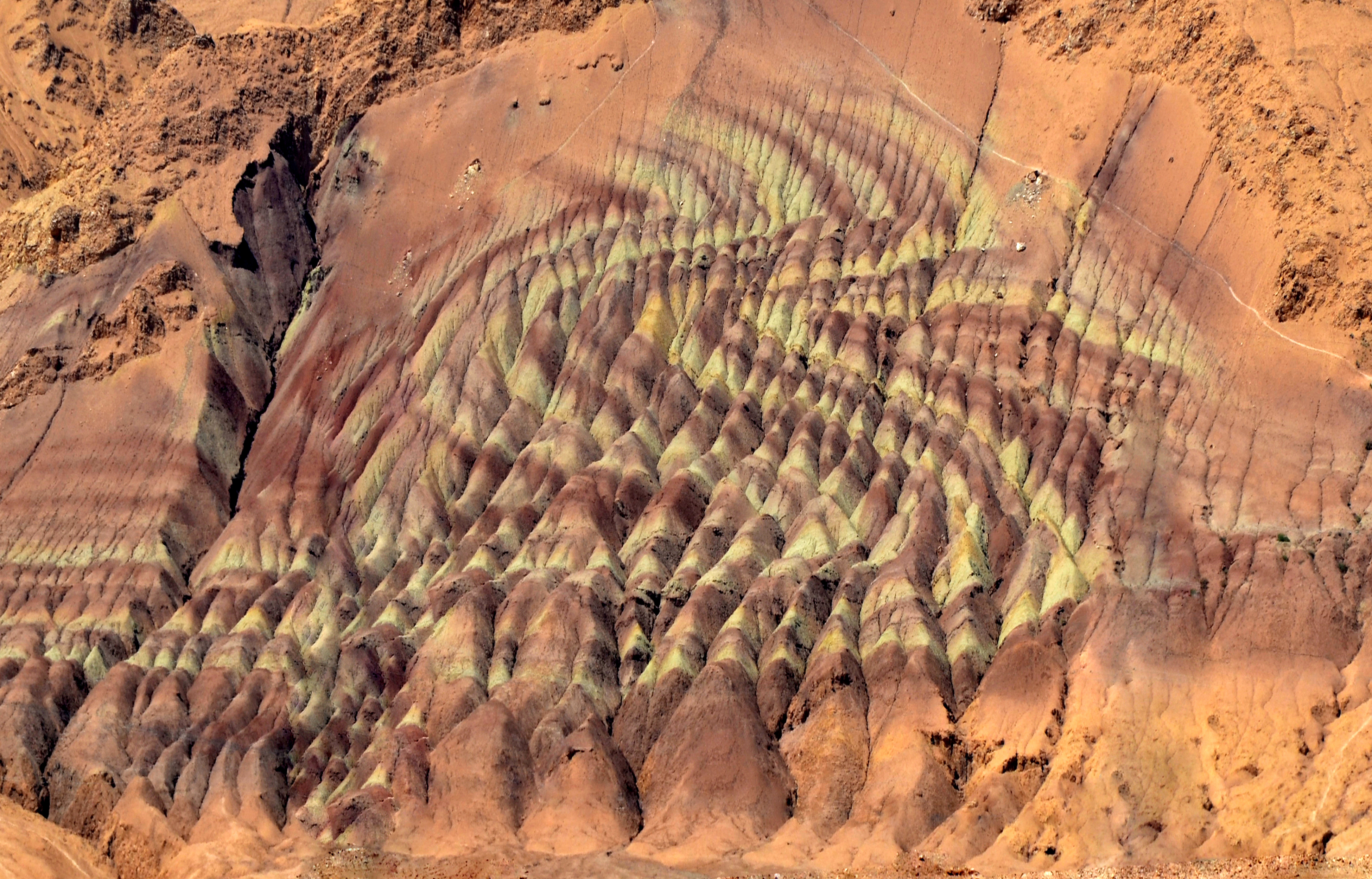 Garmsar